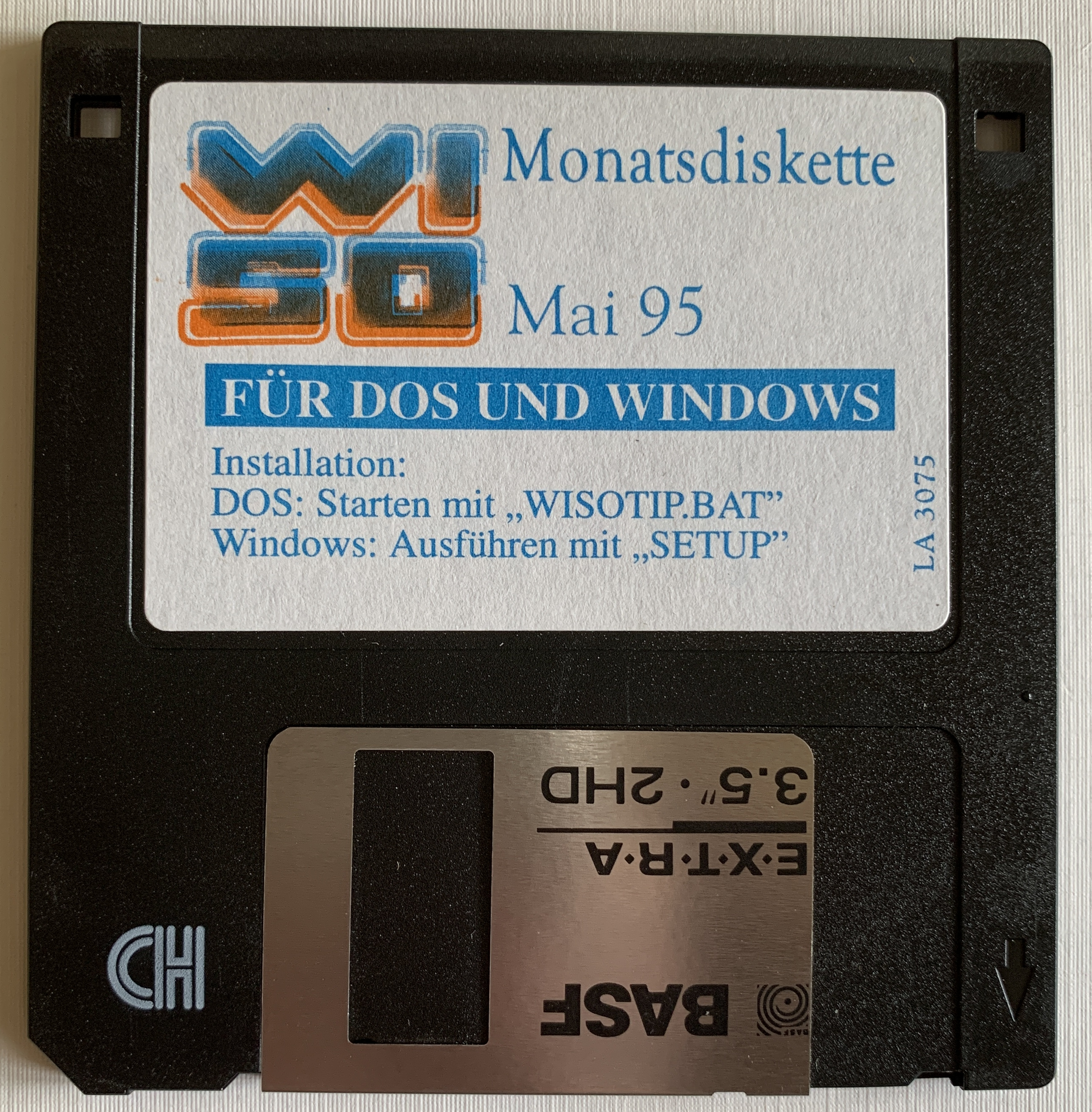 WISI-Monatsdiskette (1995)